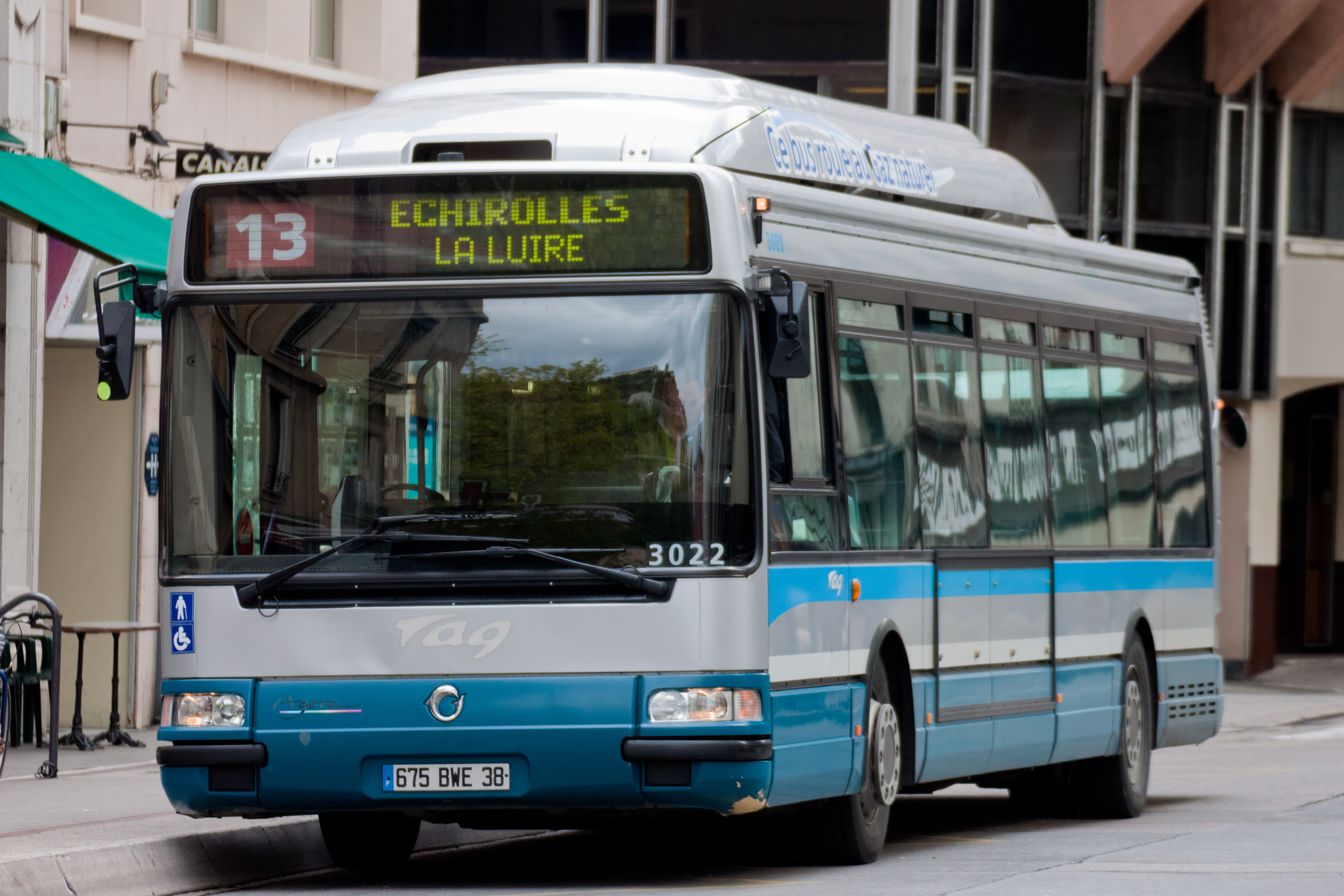 Un Irisbus Agora GNV sur la ligne 13 de la TAG (Grenoble), à son terminus Grenoble - 3 Dauphins